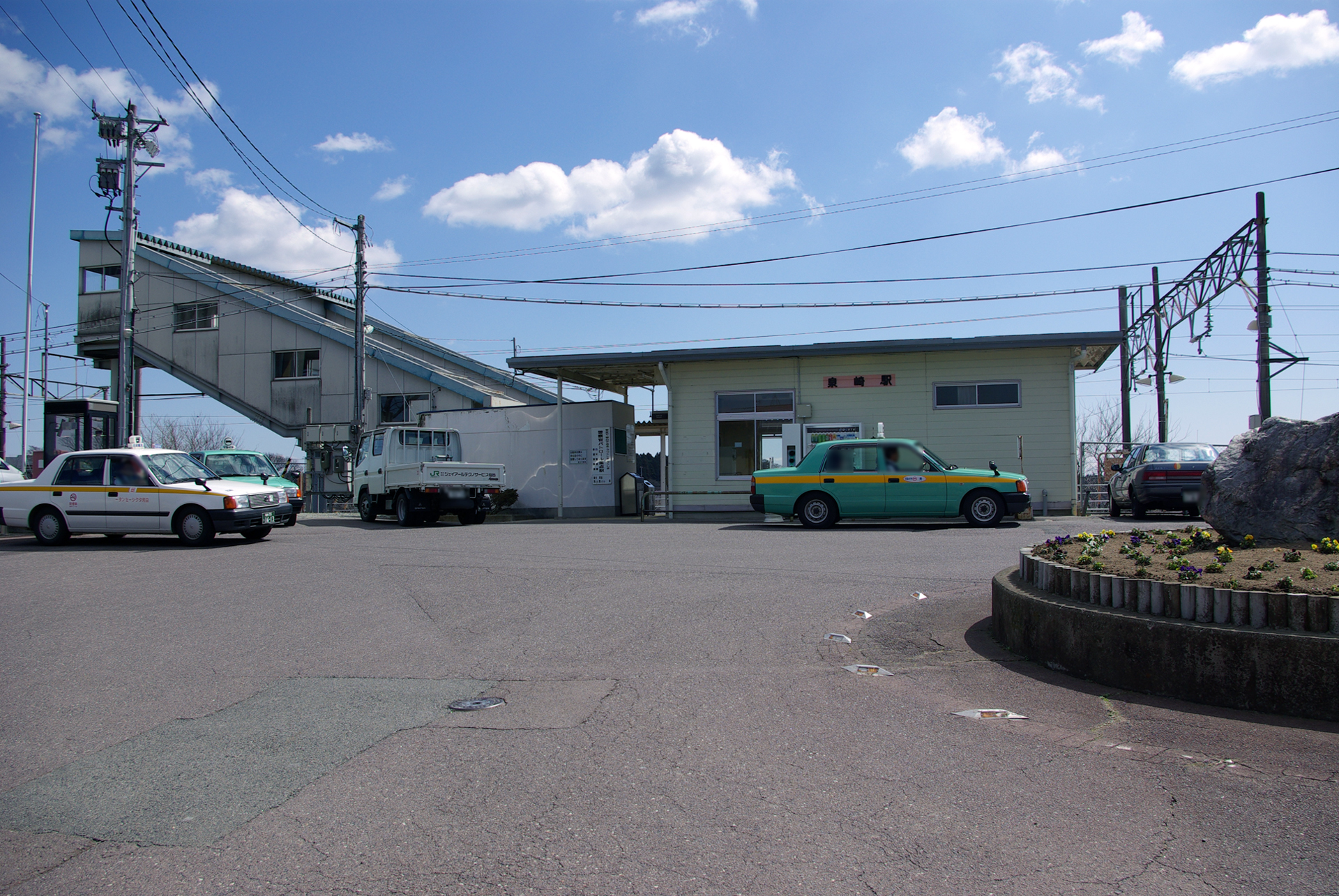 東北本線泉崎駅